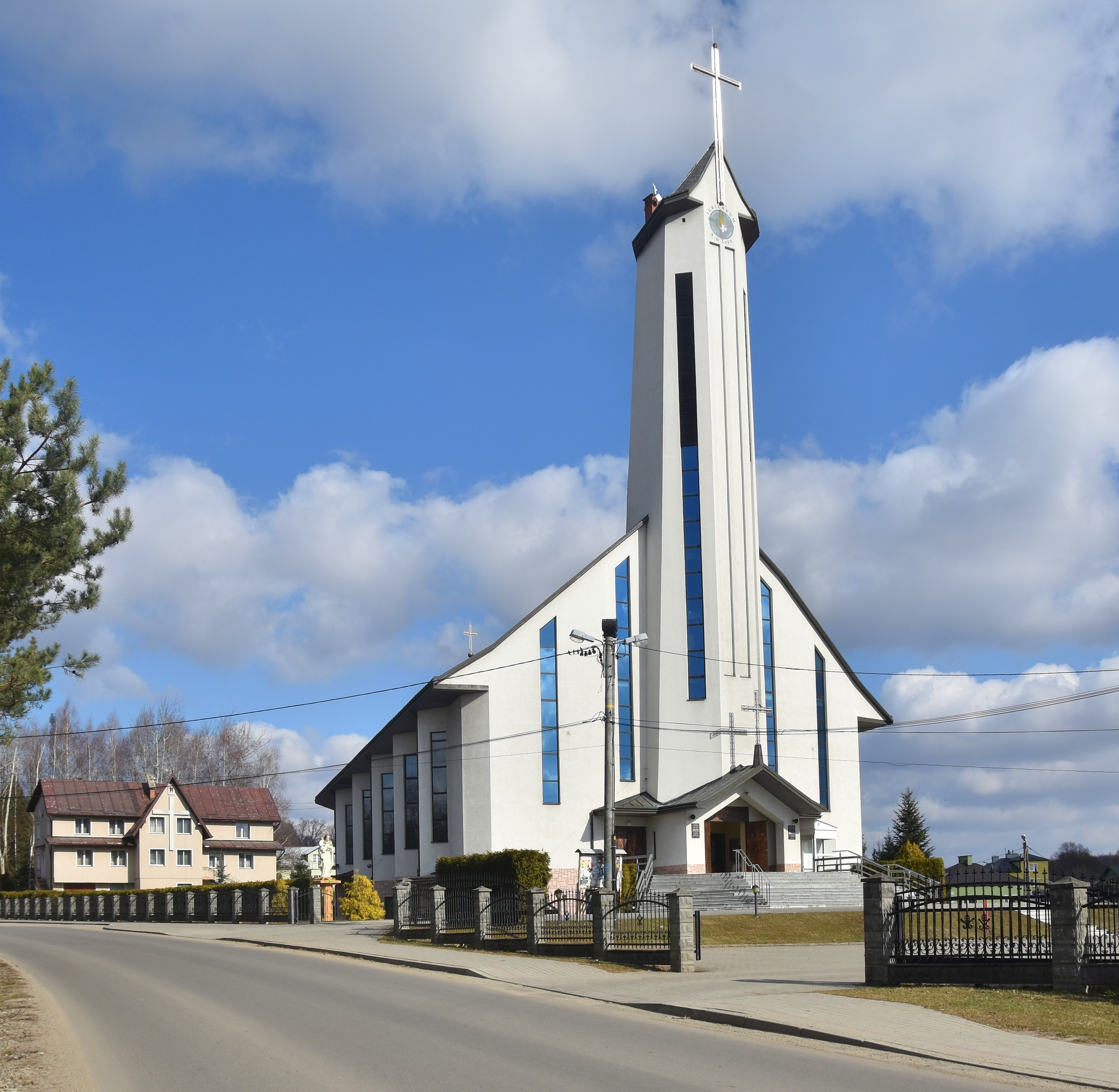 wieś Skołyszyn